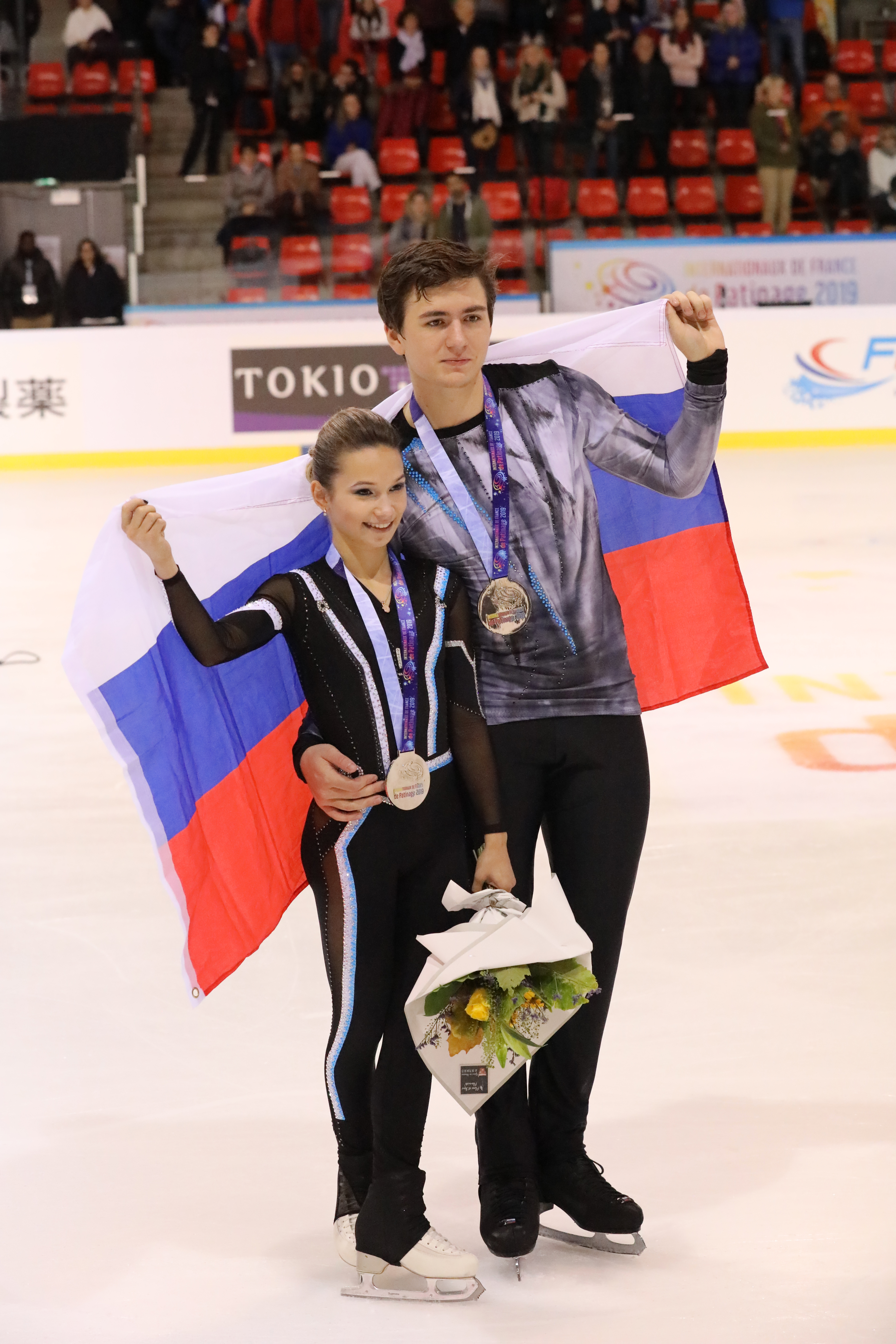 Internationaux de France 2019